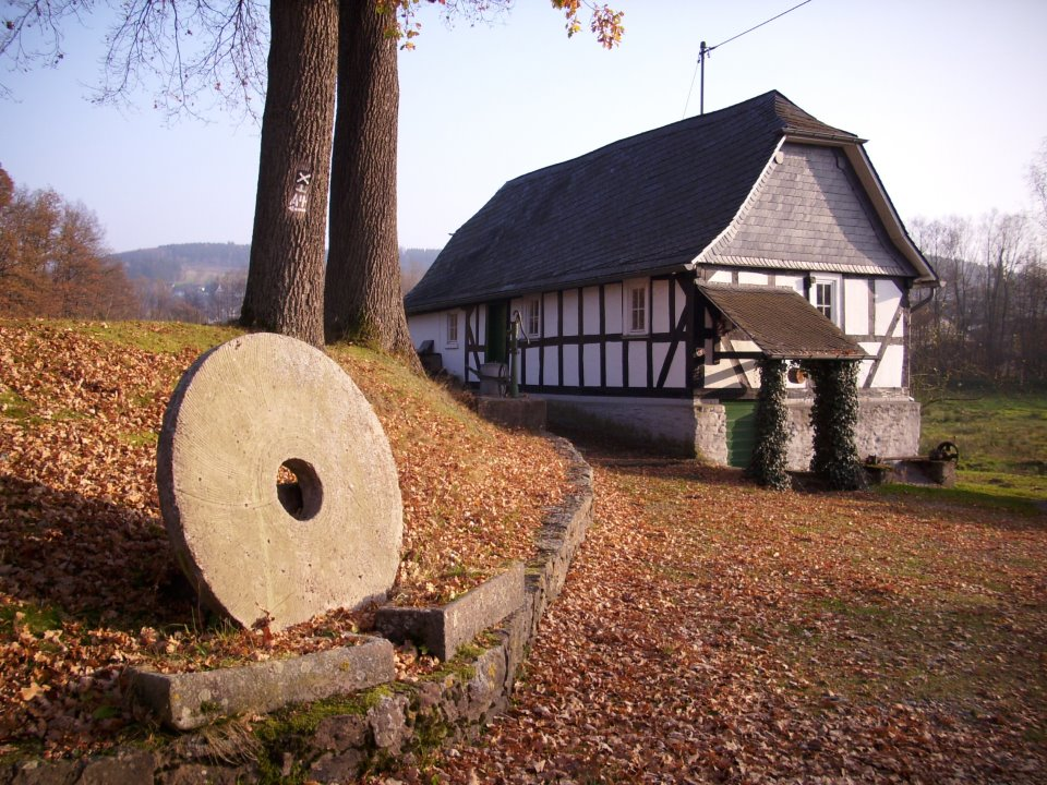 Die Niederdielfer Wassermühle im Herbst 2011, Wilnsdorf.